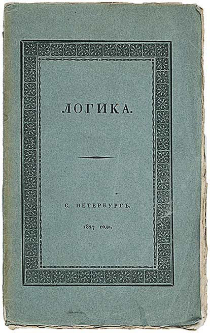 «Логика» — одно из лучших руководств середины XIX века. Автор Матвей Иванович Талызин (1784—1855) — русский педагог и философ, профессор Главного педагогического института, составитель нескольких учебников; статский советник.